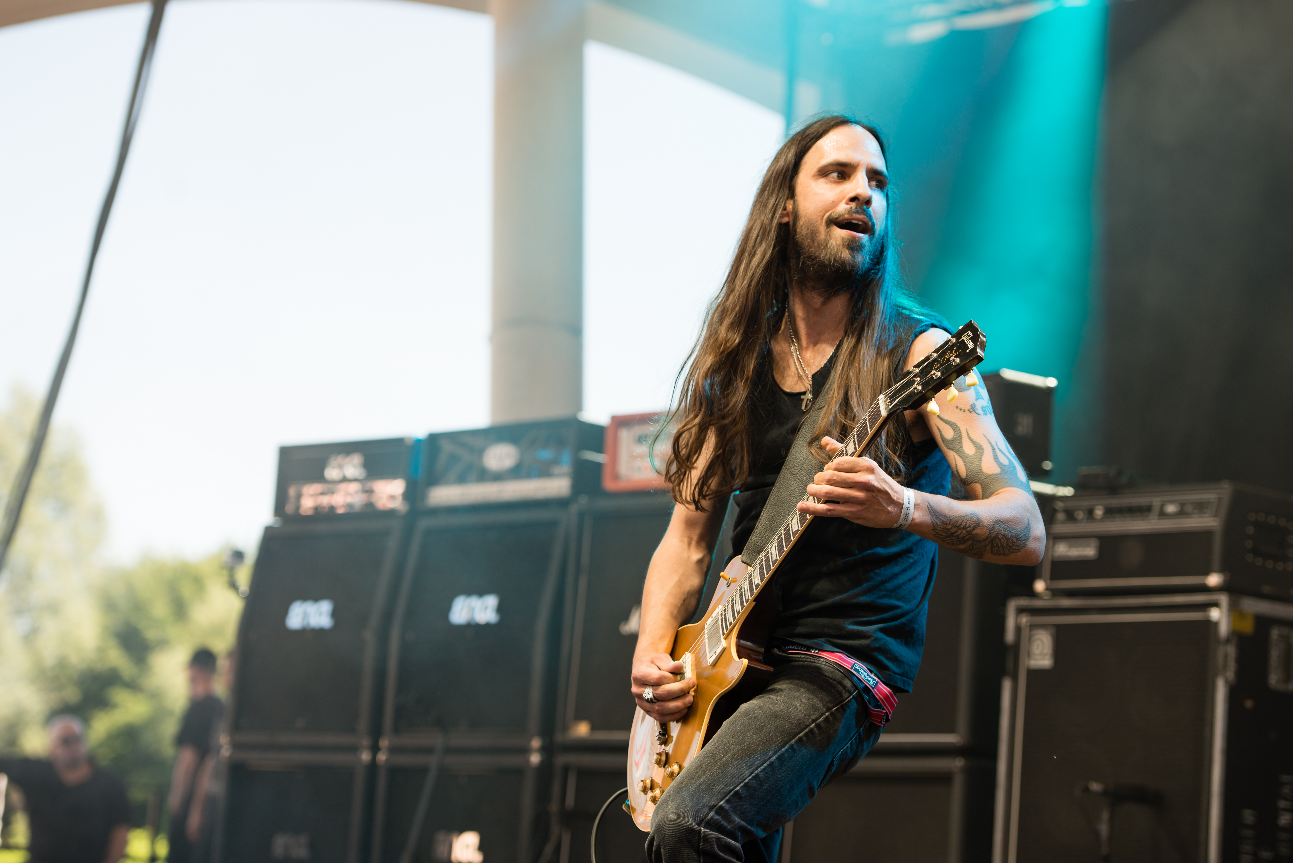 'Rock Hard Festival 2014 - Gelsenkirchen': 'Zodiac'